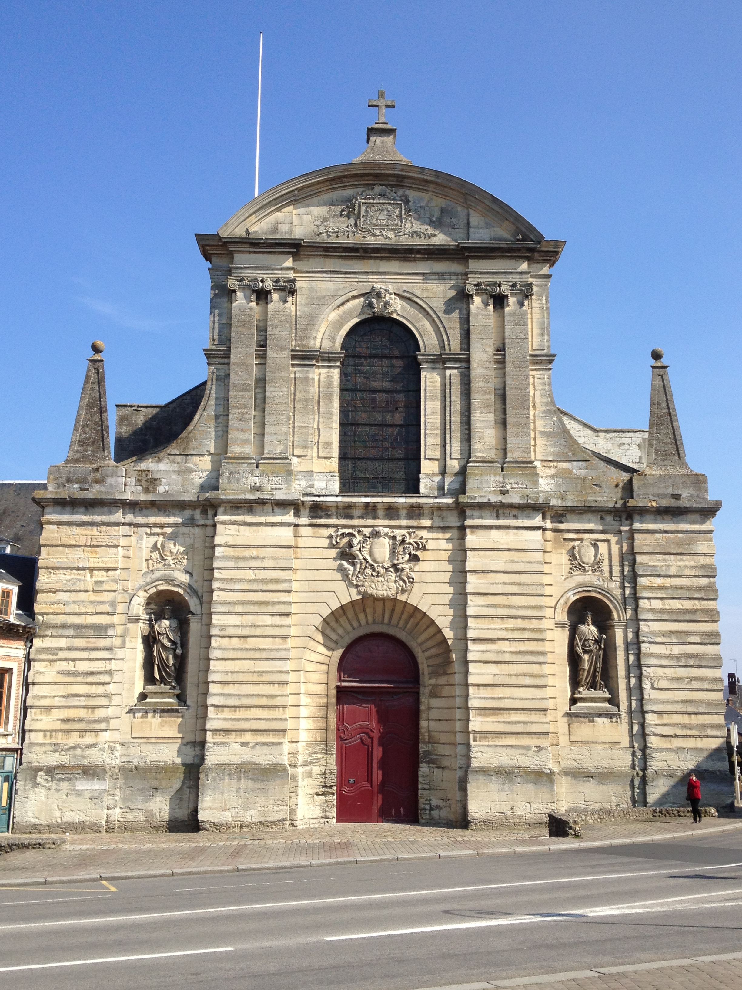 Façade occidentale de style classique (1748) de l'abbatiale.